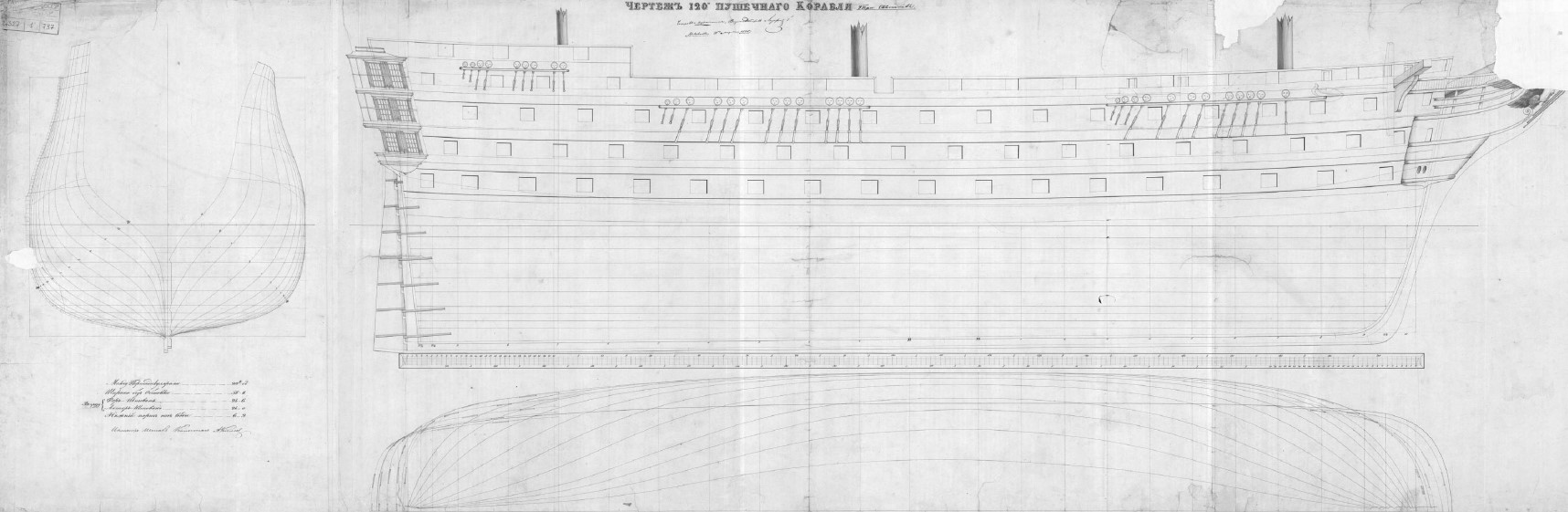 Чертёж линейного корабля «Три Святителя»